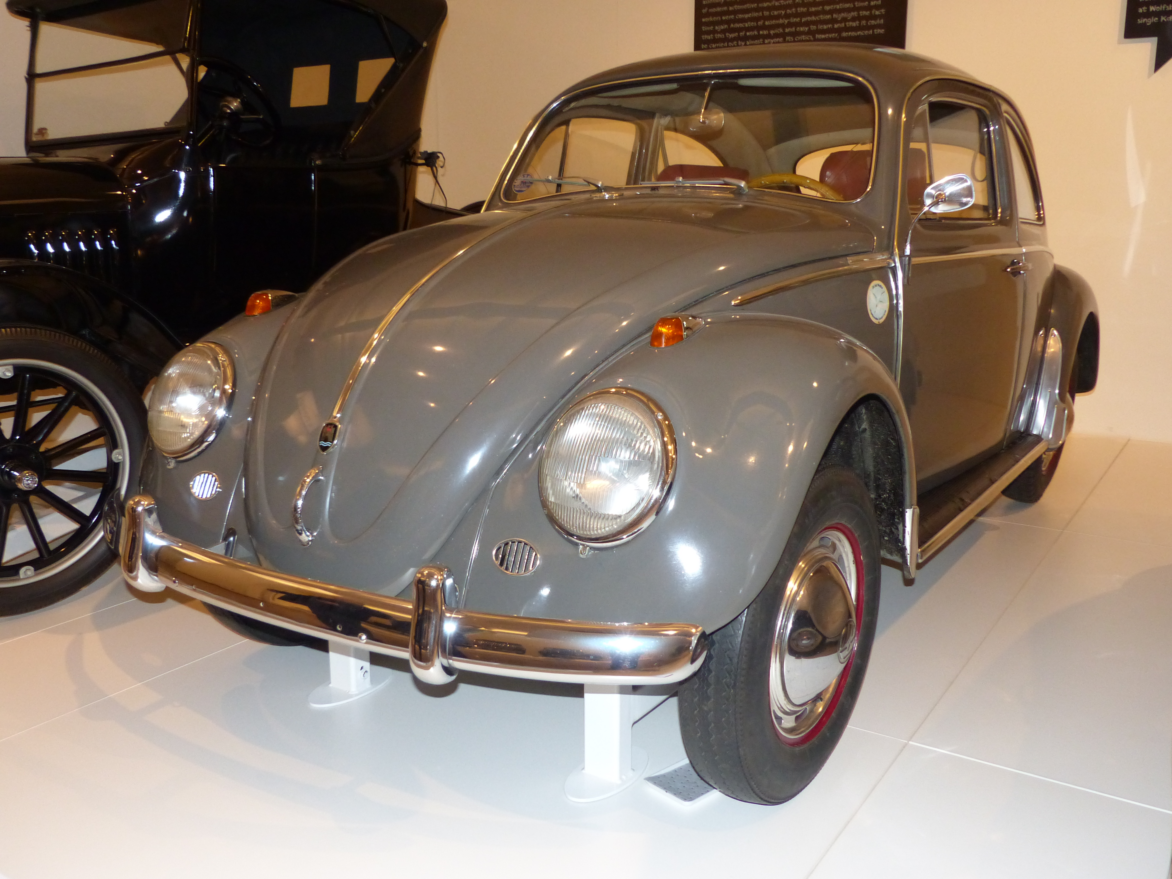 Volkswagen "Käfer" Typ 1200 Luxus, 34 PS, 1961; Exponat im Technischen Museum Wien